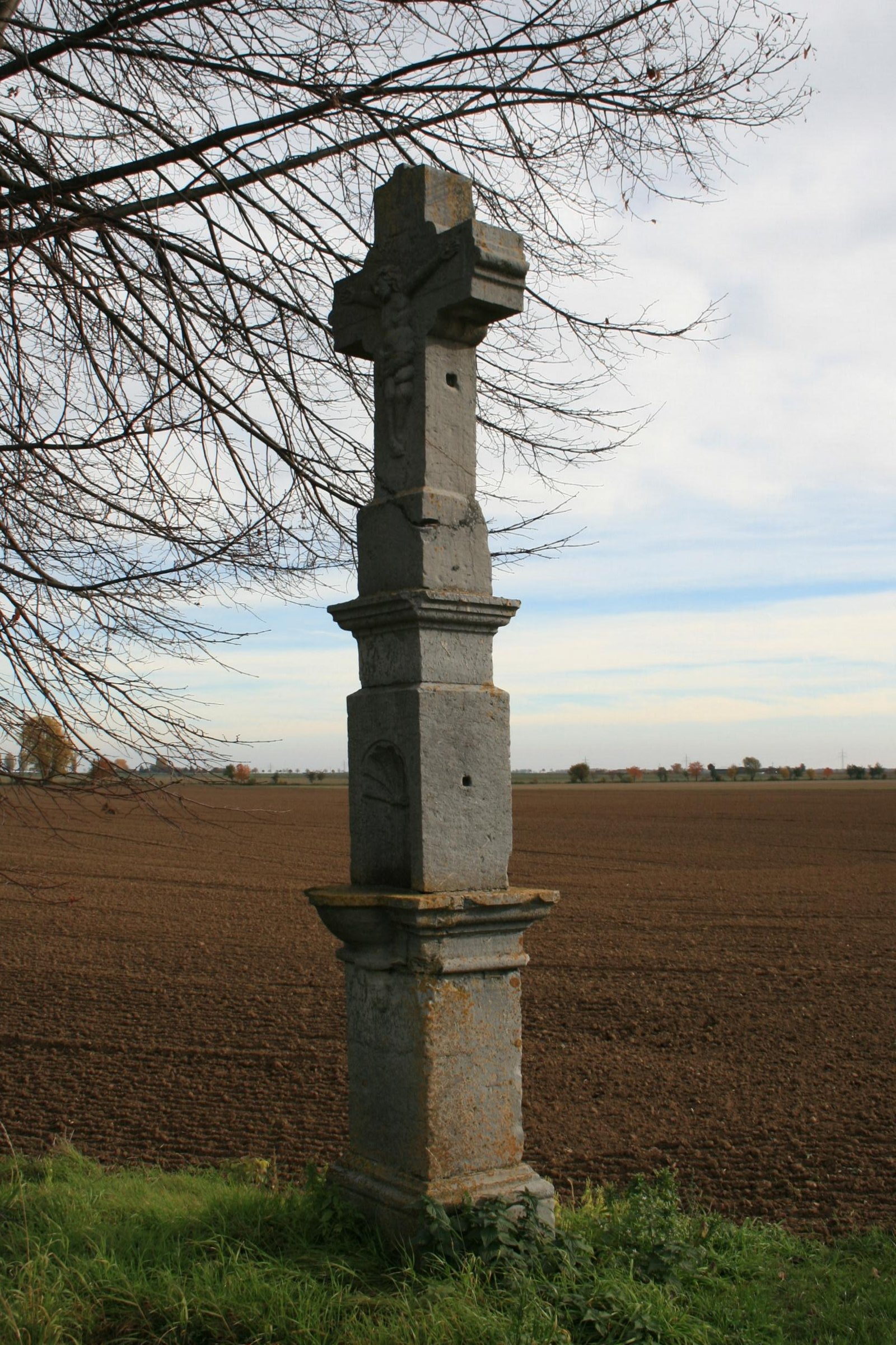 Das Kirschenkreuz an der Landstraße 327 zwischen Nörvenich-Römmelsheim und Burg Bubenheim